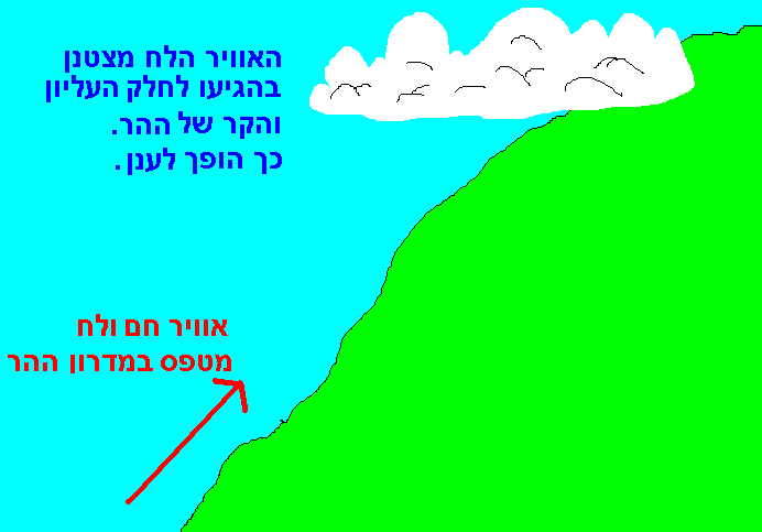 תרשים המתאר היווצרות ענן כתוצאה מהר.